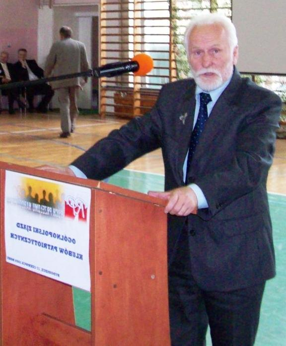 Własna Praca